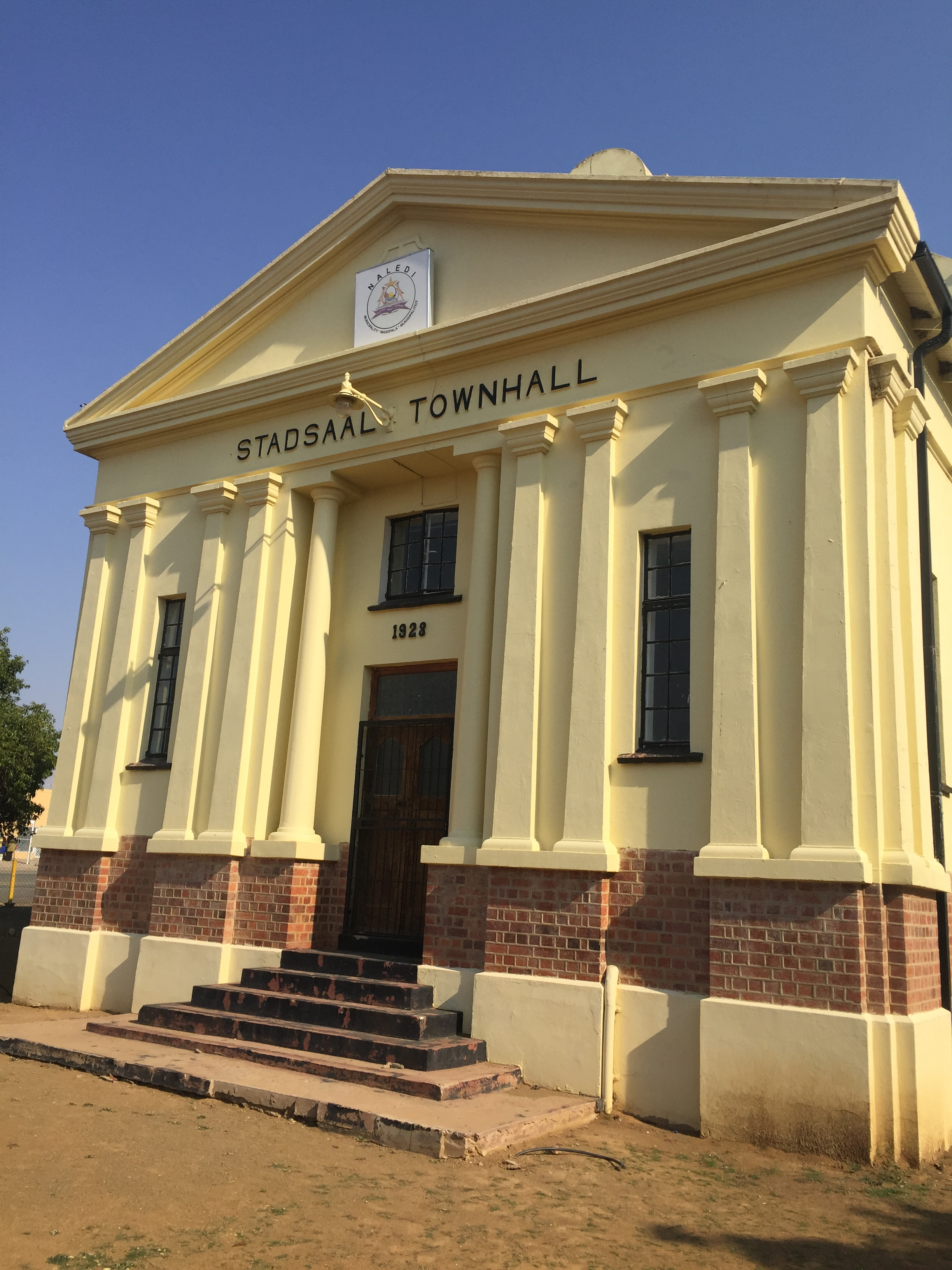 Dewetsdorp Town Hall